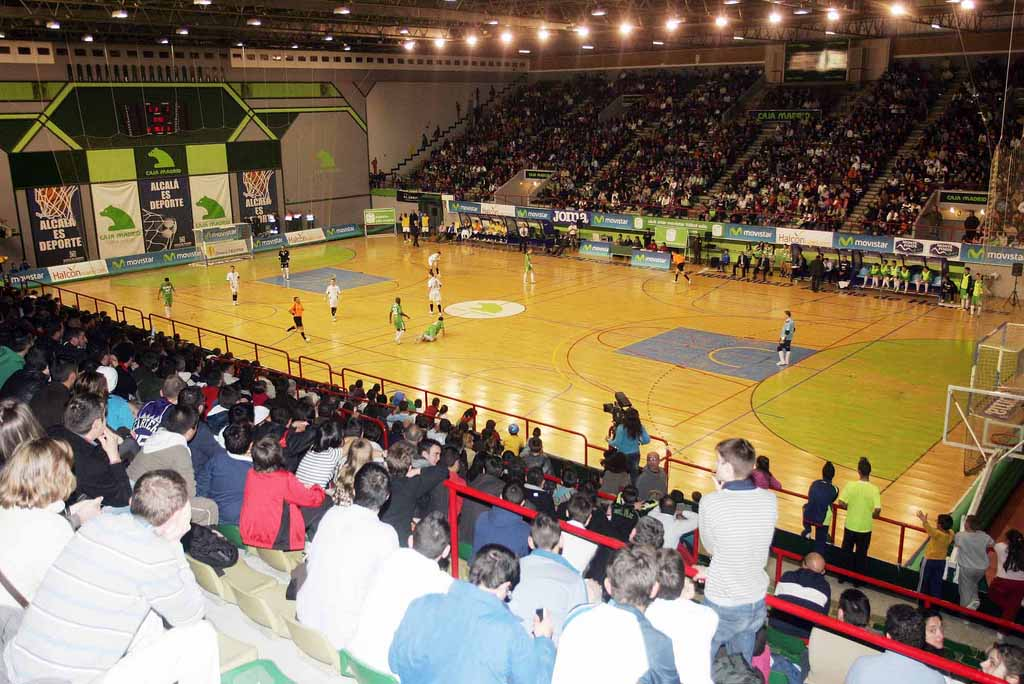 foto interior pabellon Caja Madrid durante el partido de futbol sala Inter Movistar-Carnicer Torrejón